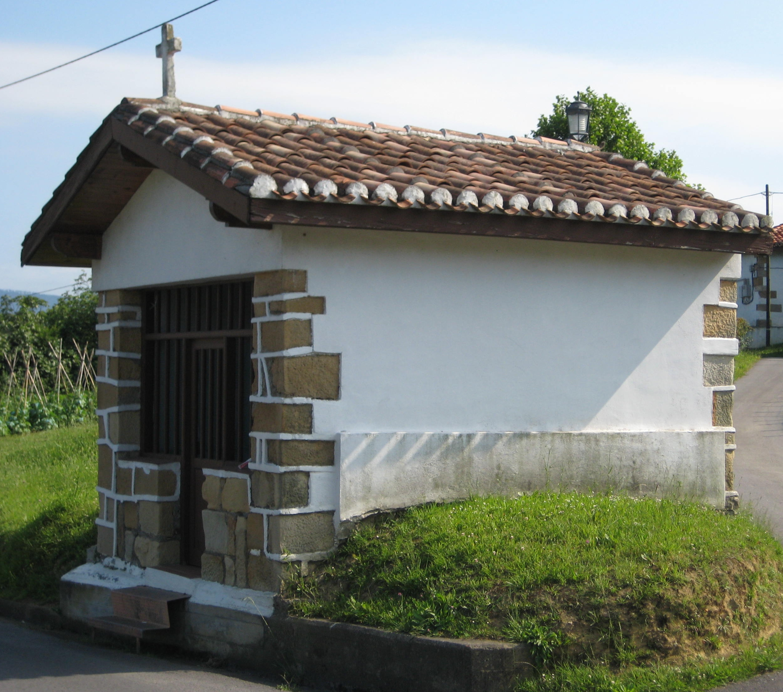 2011-06-14. ermita de la Magdalena en Erandio, Vizcaya, País Vasco, España.